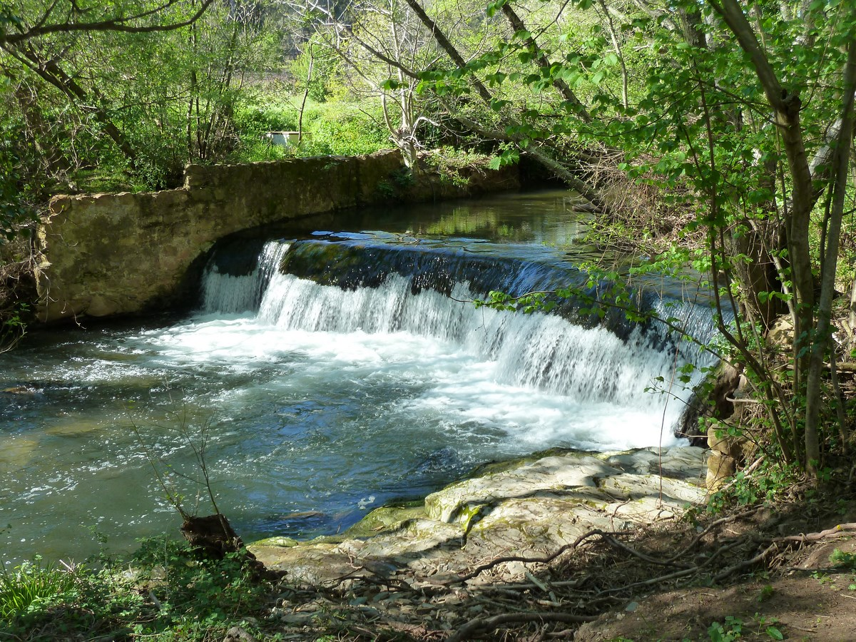 Rivière le Réal Martin à la Portanière, commune de Pierrefeu-du-Var France